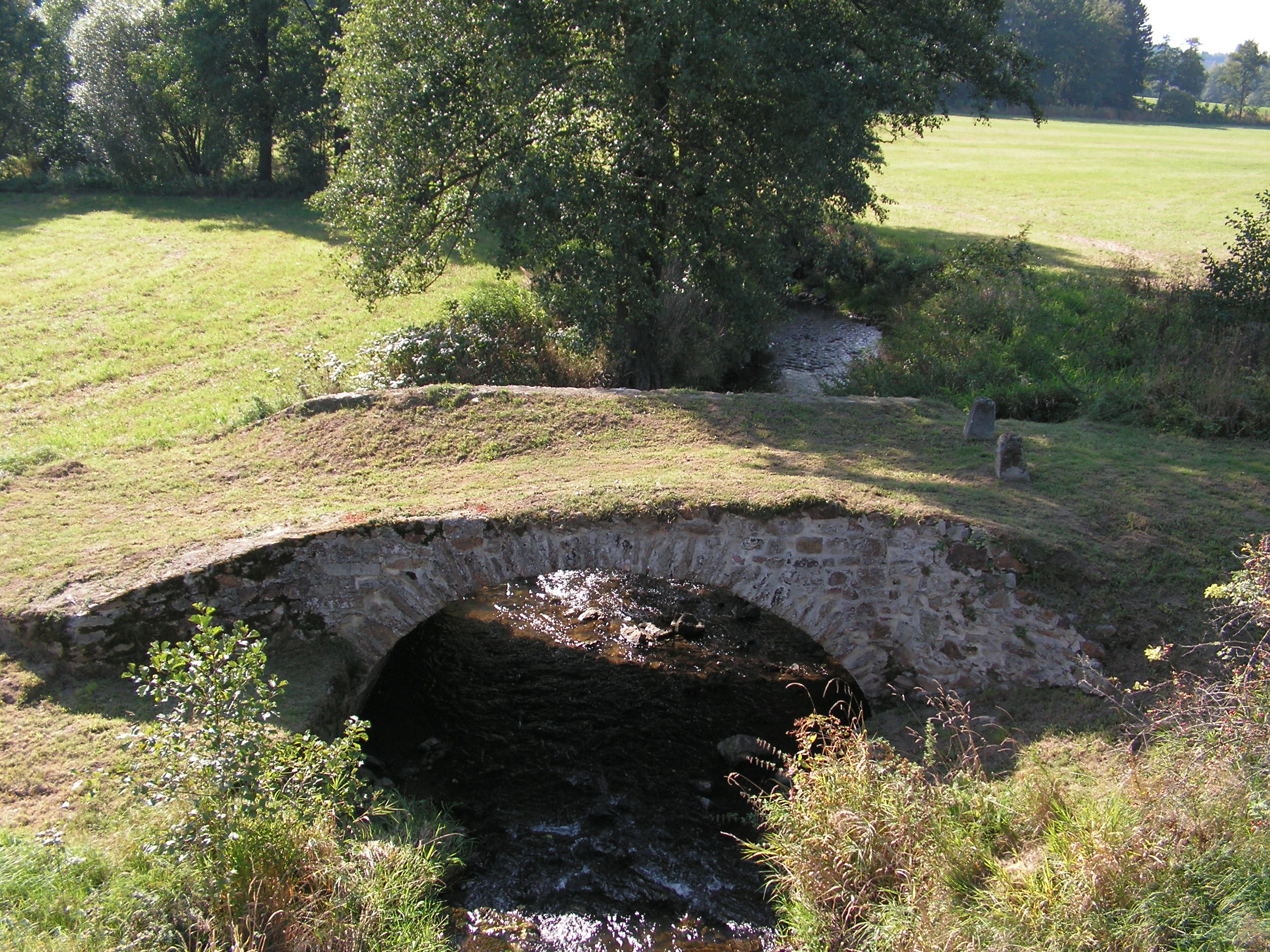 Starý most přes Borovský potok pod obcí Stříbrné Hory.